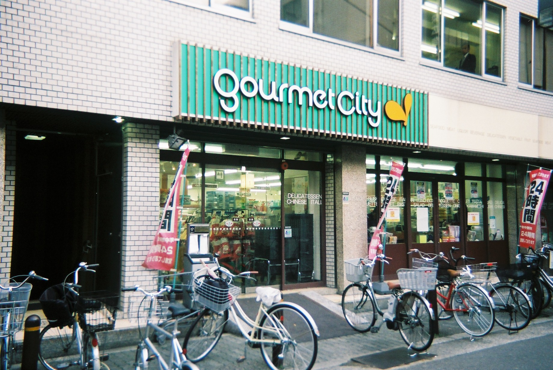 2008年11月17日に投稿者が撮影。